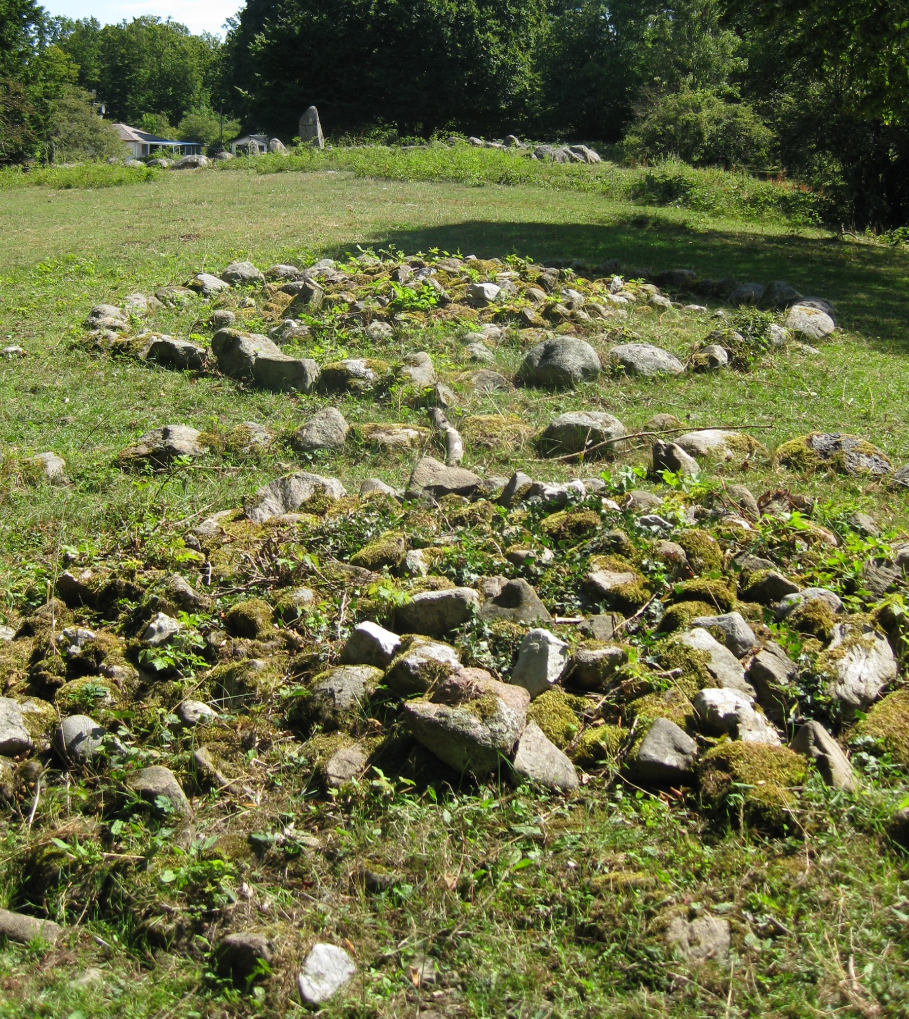 Ängakåsen. Runda stensättningar på gravfält nära kungagraven i Kivik.